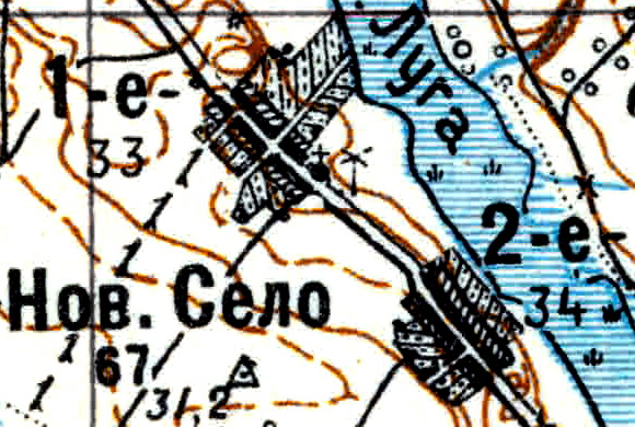 Топографическая карта Ленинградской области, квадрат Vc-29 (Батецкая), деревни Новое Село-1 и Новое Село-2